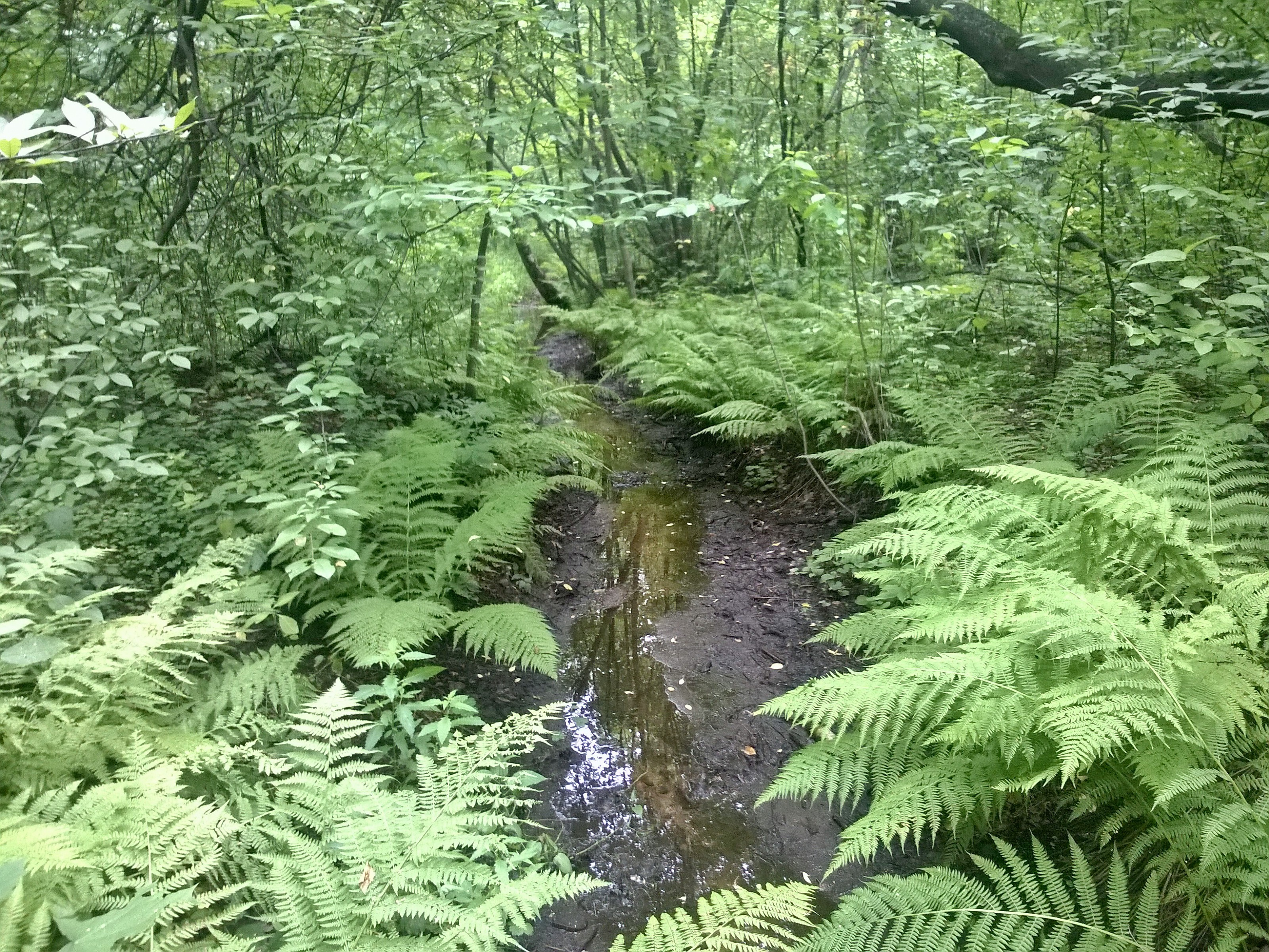 Москва. Сокольники. Олений ручей